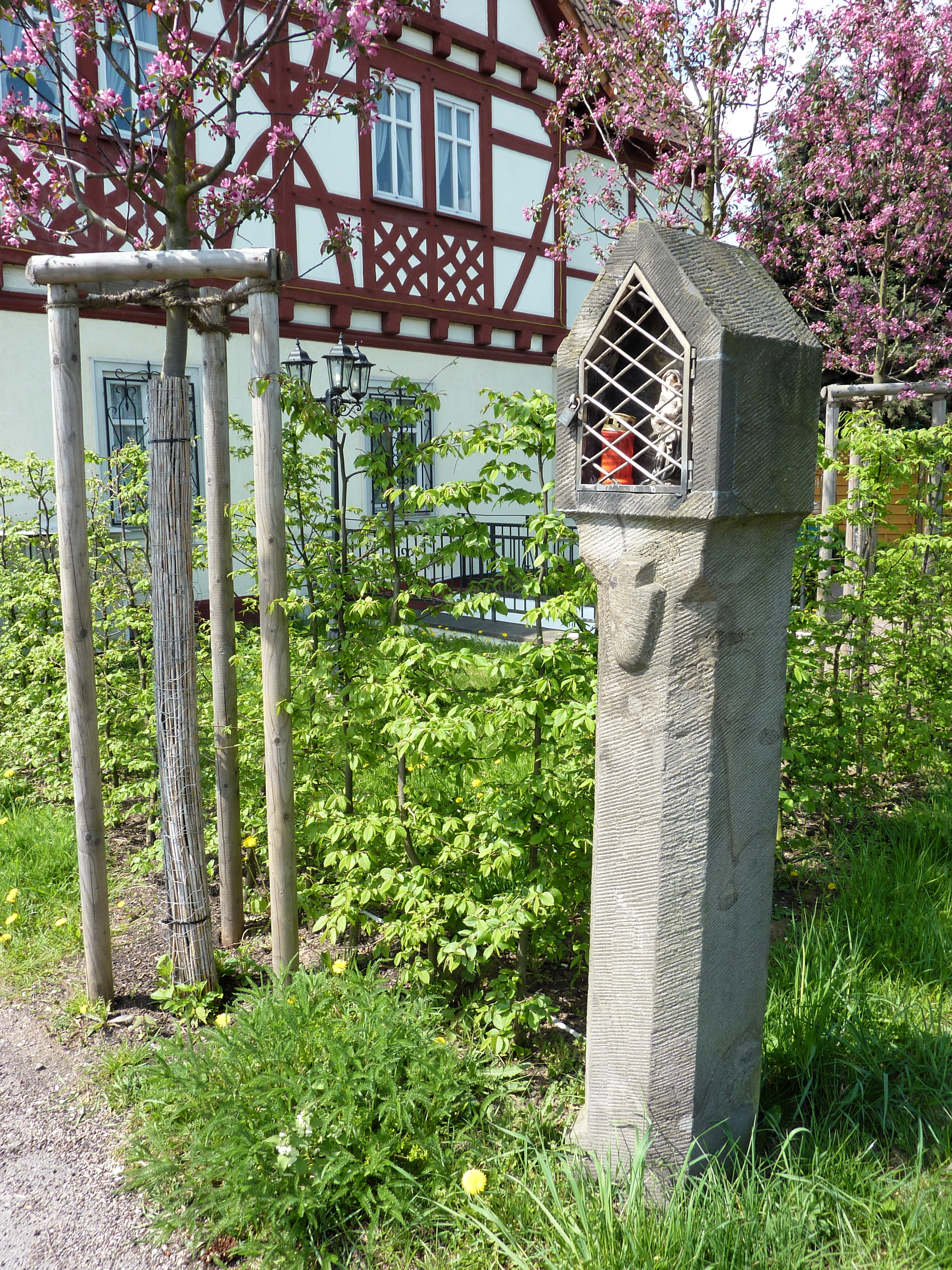 Bildstock mit einer Madonnenfigur am Alten Zollhaus an der Friedberger Landstraße über den Berger Rücken in Frankfurt am Main. Dieser Bildstock gab dem angrenzenden Hochplateau-Gelände den Flurnamen Heiligenstock.